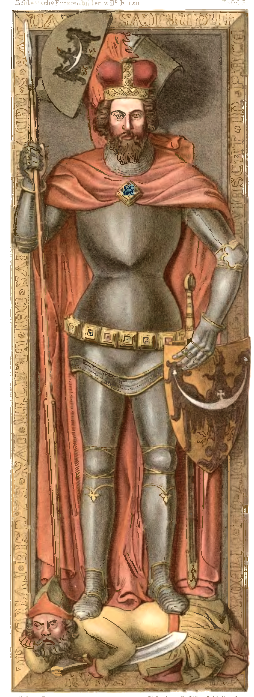 Henryk II Pobożny tomb effigy